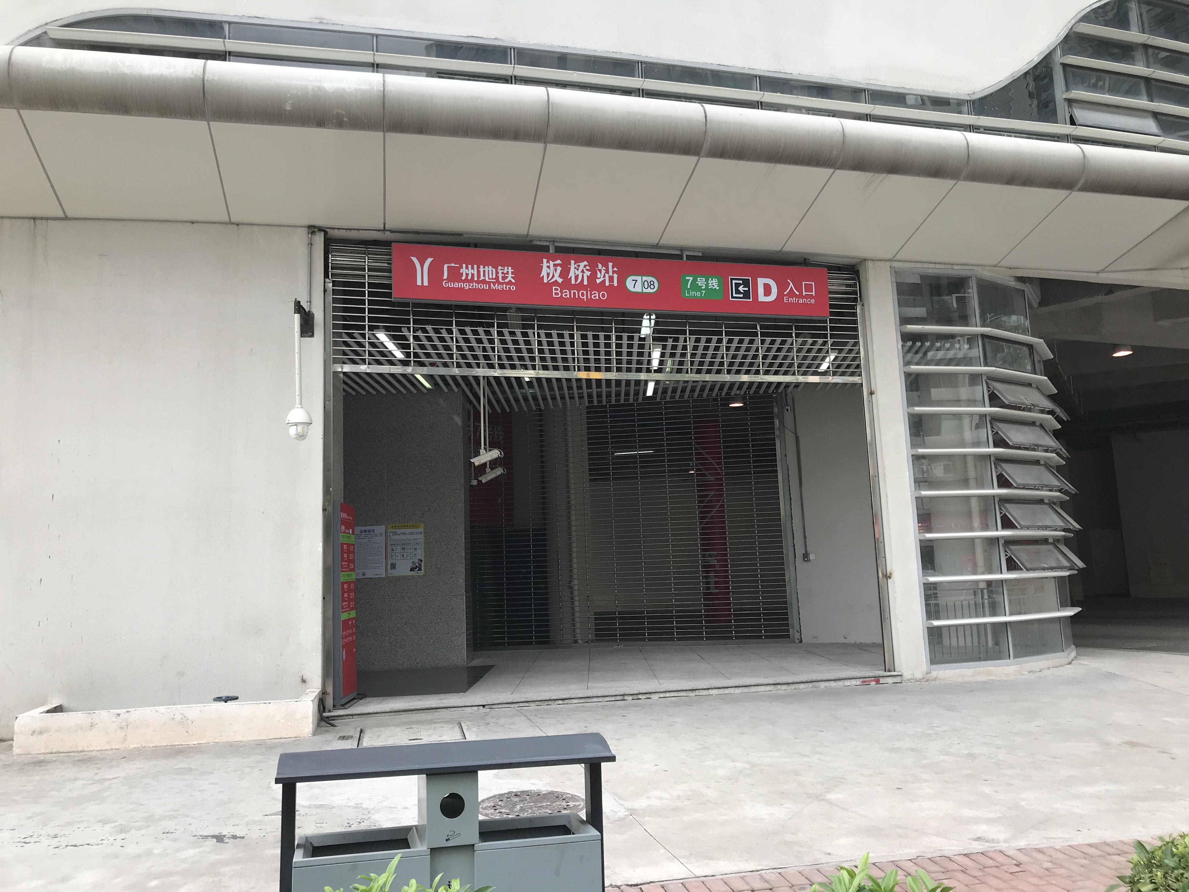 中文（中国大陆）: 广州地铁板桥站